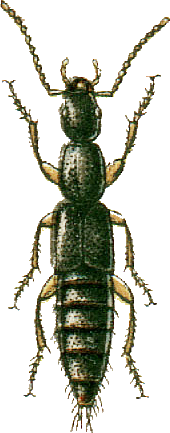 This file has been extracted from another file: Jacobs14.jpg